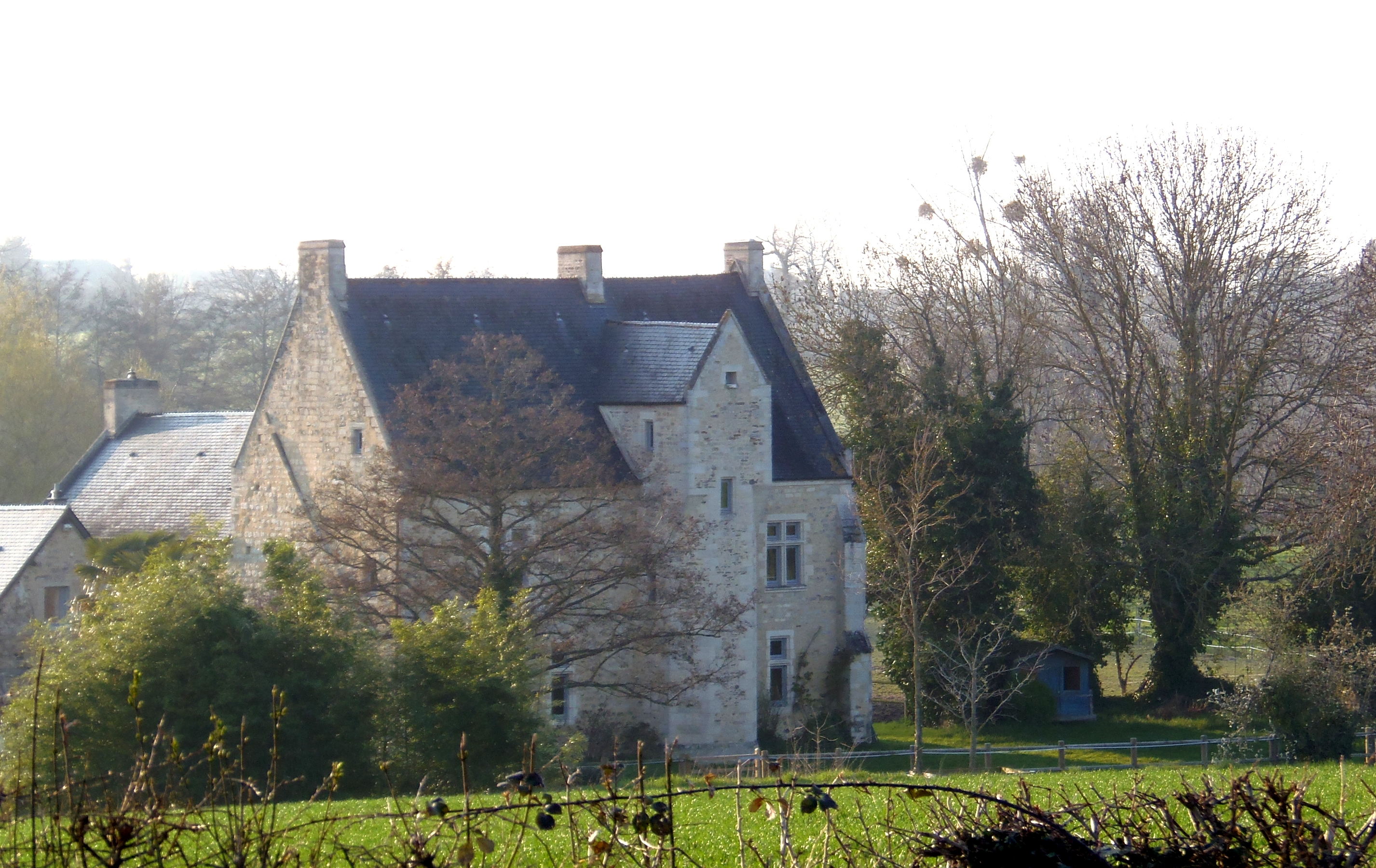 Noron-la-Poterie (Normandie, France). Le manoir du Pont-Senot.